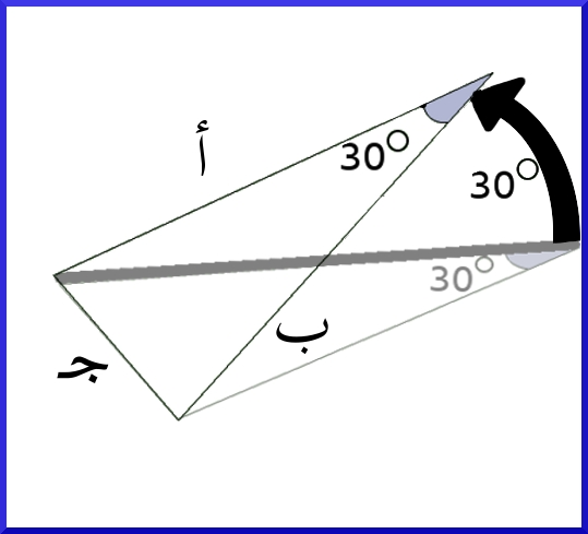 توضيح الدوران الثاني للضلع أ